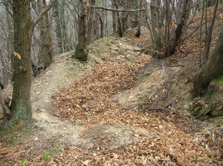 Genova, alture di Bolzaneto, resti trincea guerra 1746-1747